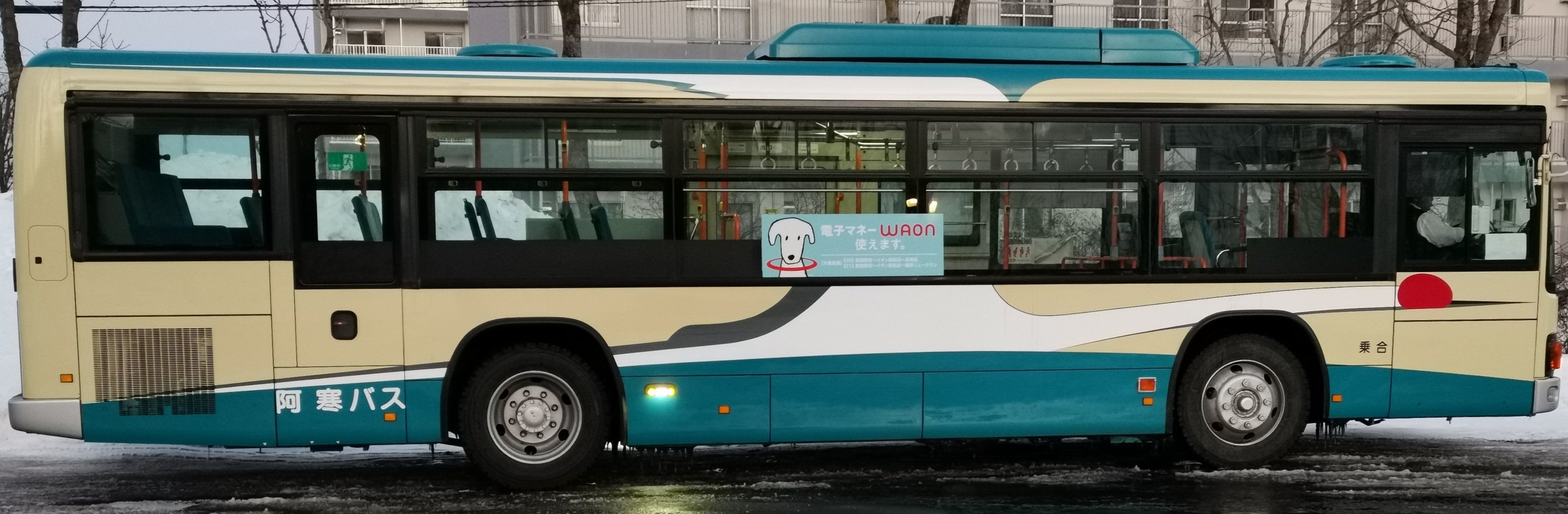 高専まりも線の運用につく車両。WAONによる決済システムを設けるため、いすゞ・エルガを新たに導入した。